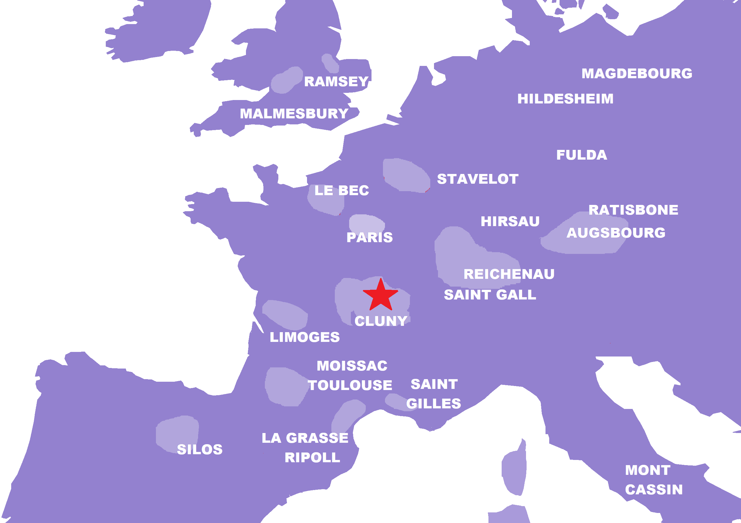 Abbayes clunisienne et zones de forte densité d'abbayes clunisiennes